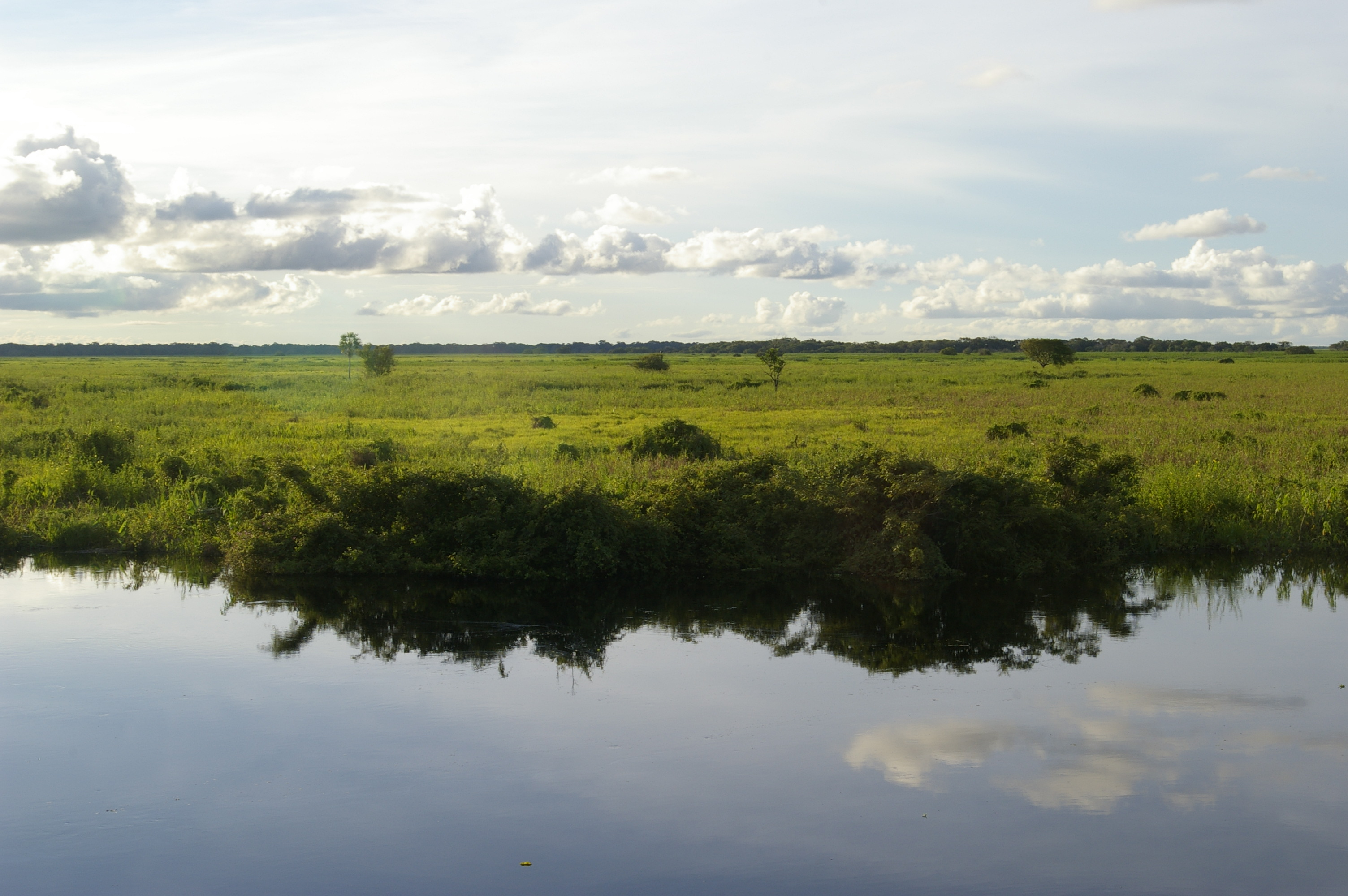 Llanos del Beni, Bolivia.